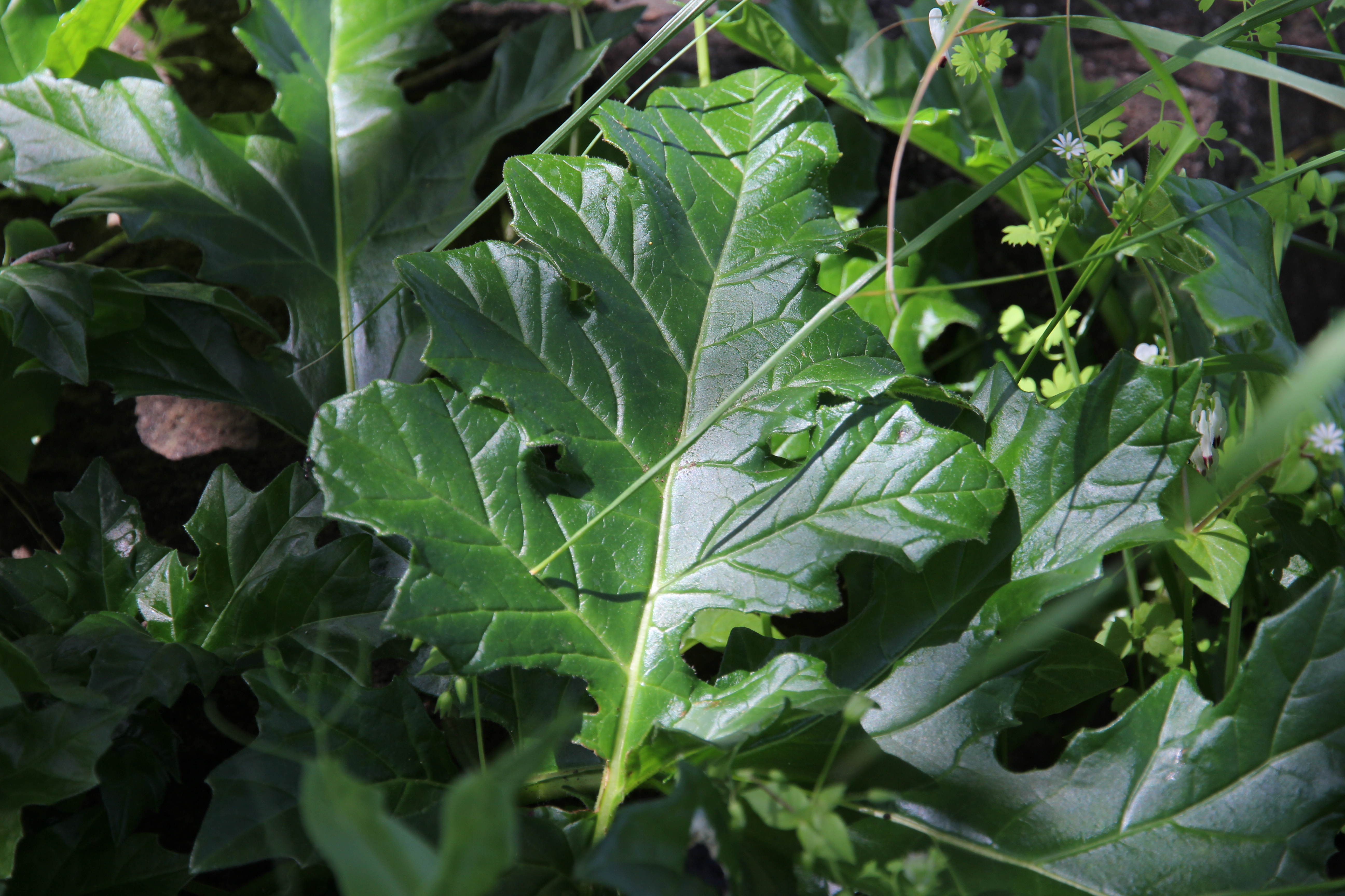 Flora della Sardegna